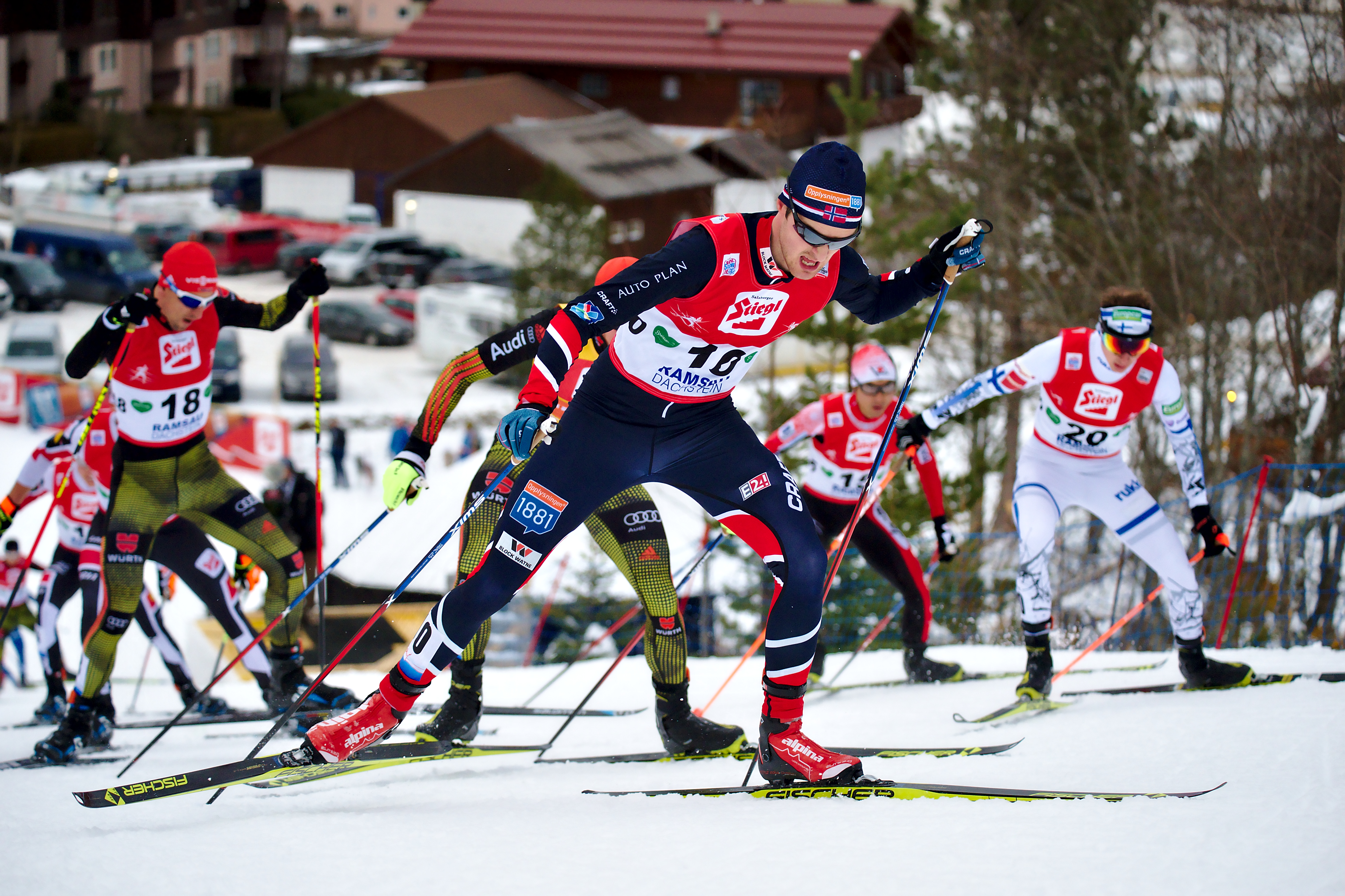 10km Gundersenlauf am Sonntag, 18.12.2016